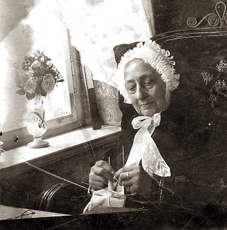 Hornjoserbsce: foto ze Serbskeho kulturneho archiwa w Budyšinje